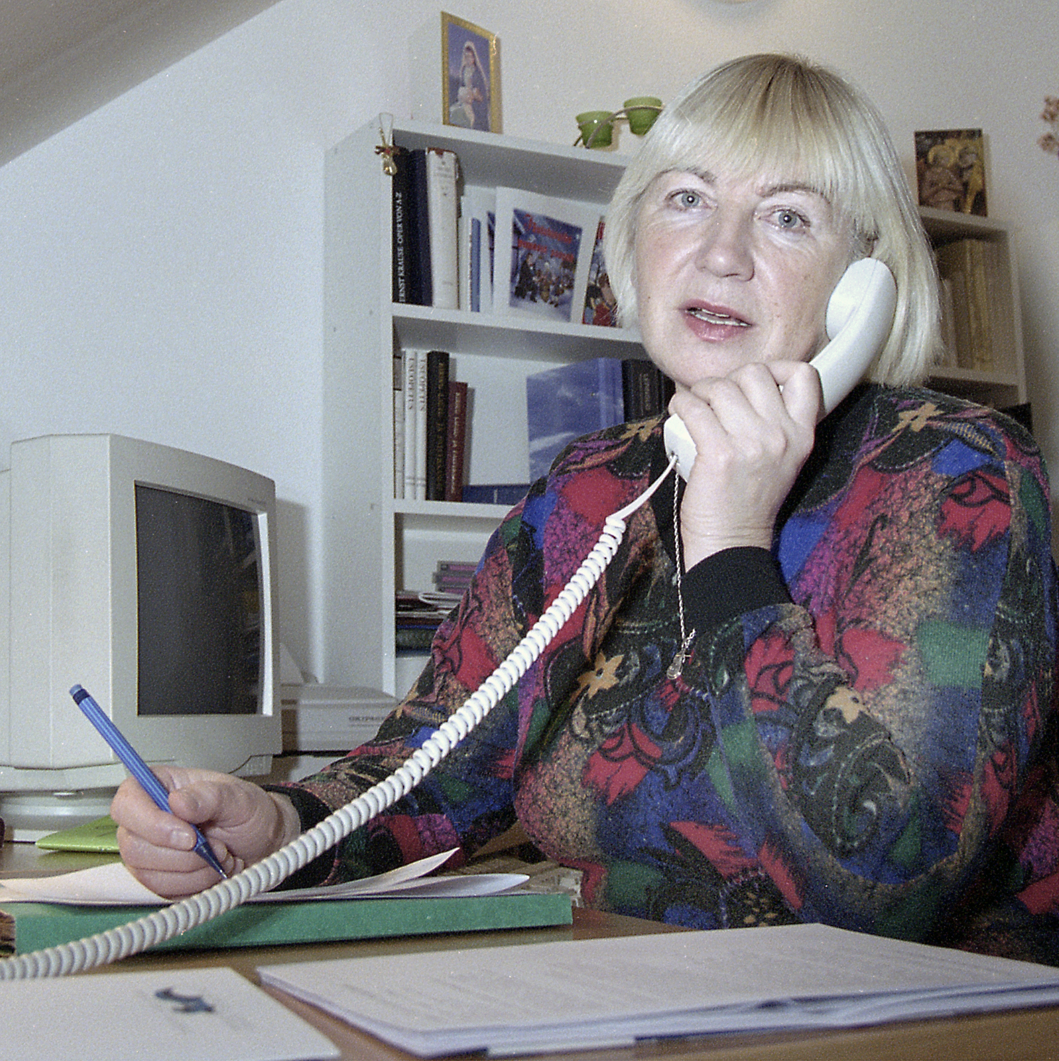 Ene Pilliroog